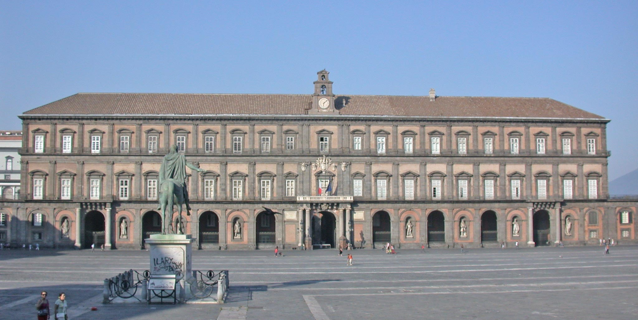 Italia, regione Campania, Napoli, Palazzo Reale, facciata su piazza del Plebiscito 1880s. 1880s. Today.